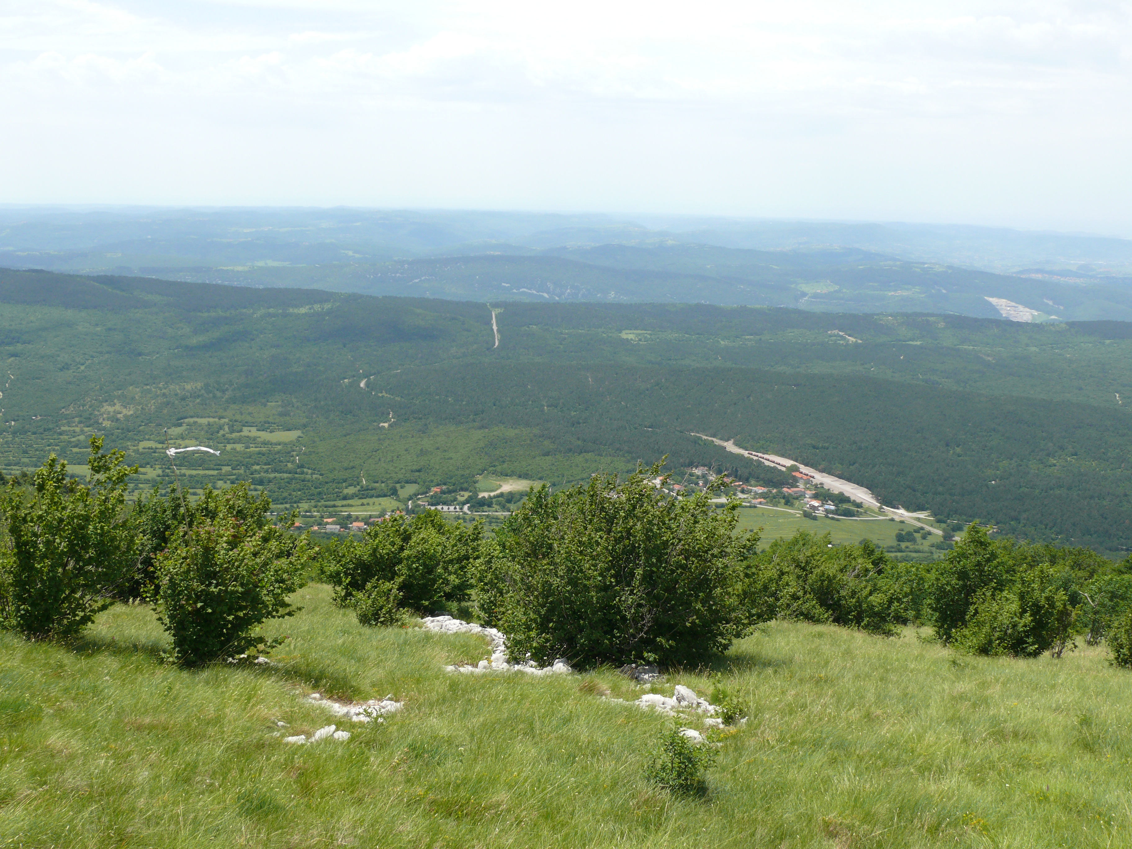 Blick vom Slavnik auf Podgorje, Slovenien